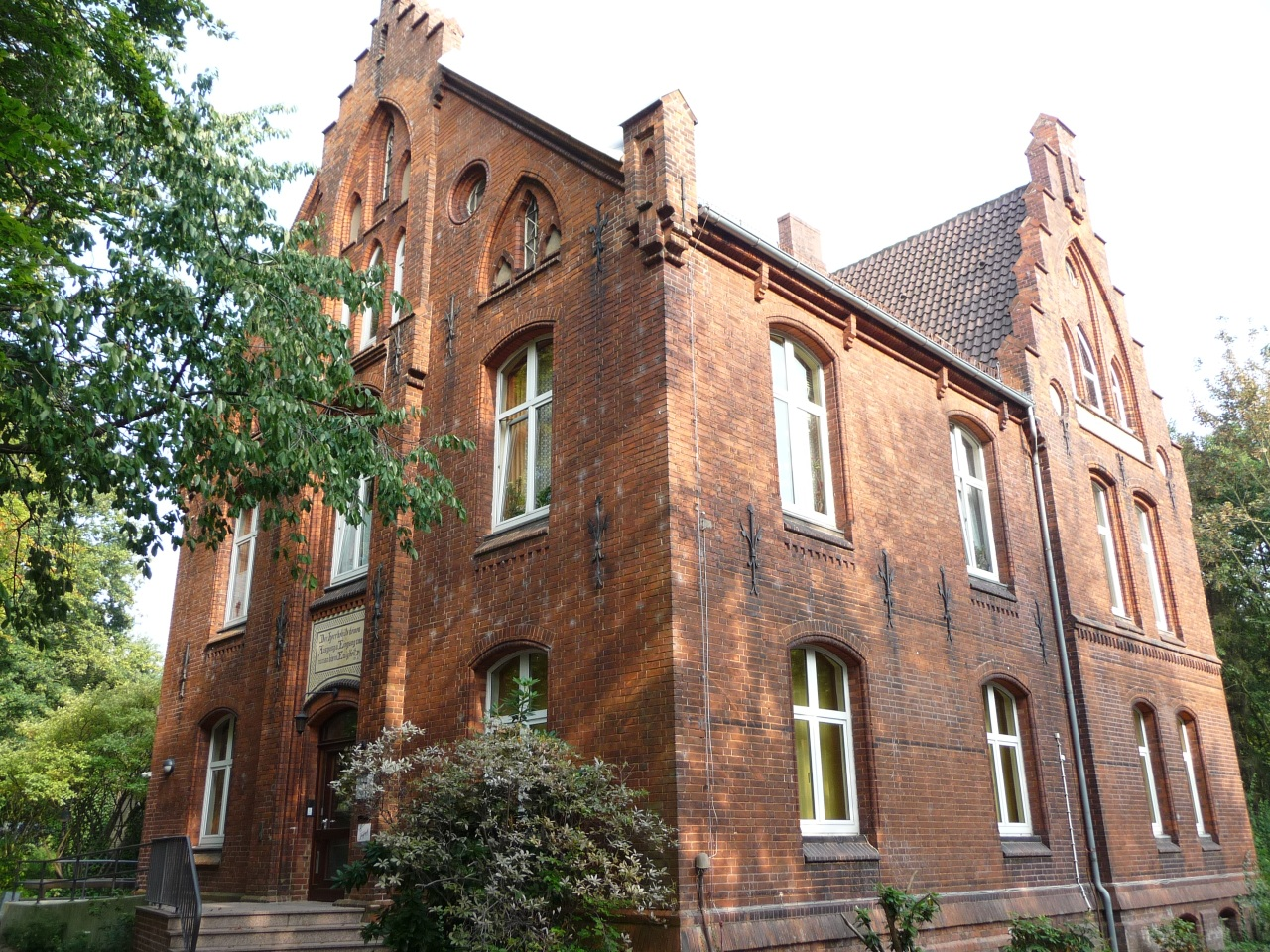 evang. Gemeindebüro Bremen-Blumenthal